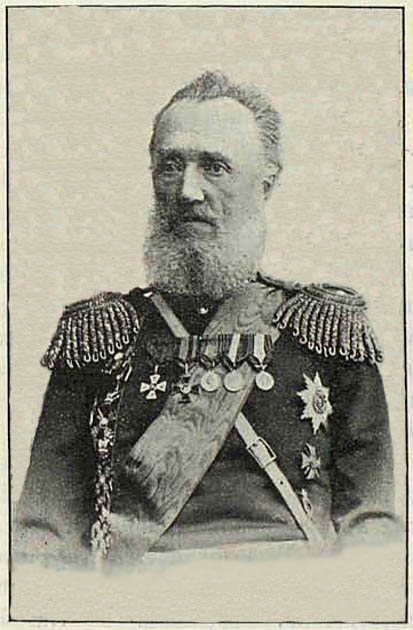 Александръ Евстафьевичъ Барановъ